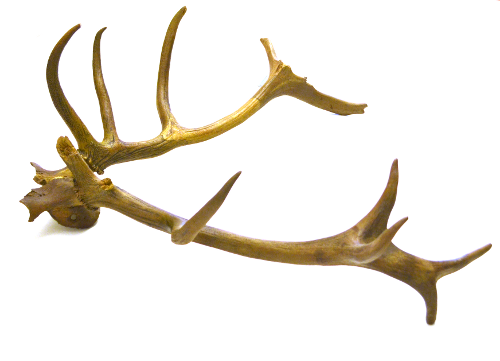 Side view of the RGZM copy of Bedburg-Königshoven antler frontlet 1